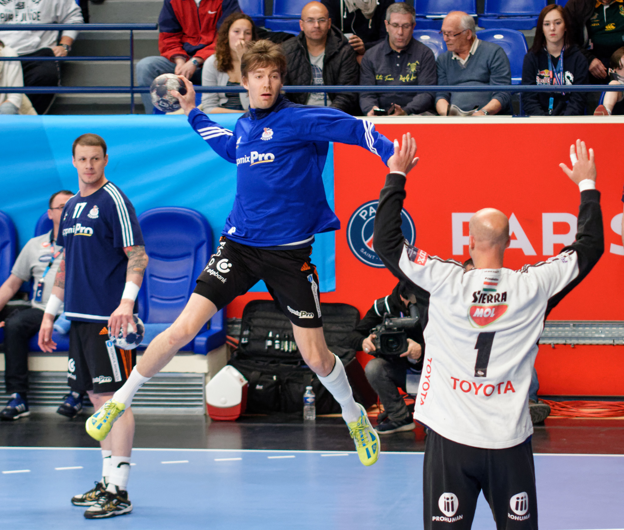 Rencontre de quart de finale de la ligue des champions 2016-17 entre le PSG et Pick Szeged. A Coubertin, le 29 avril 2017.